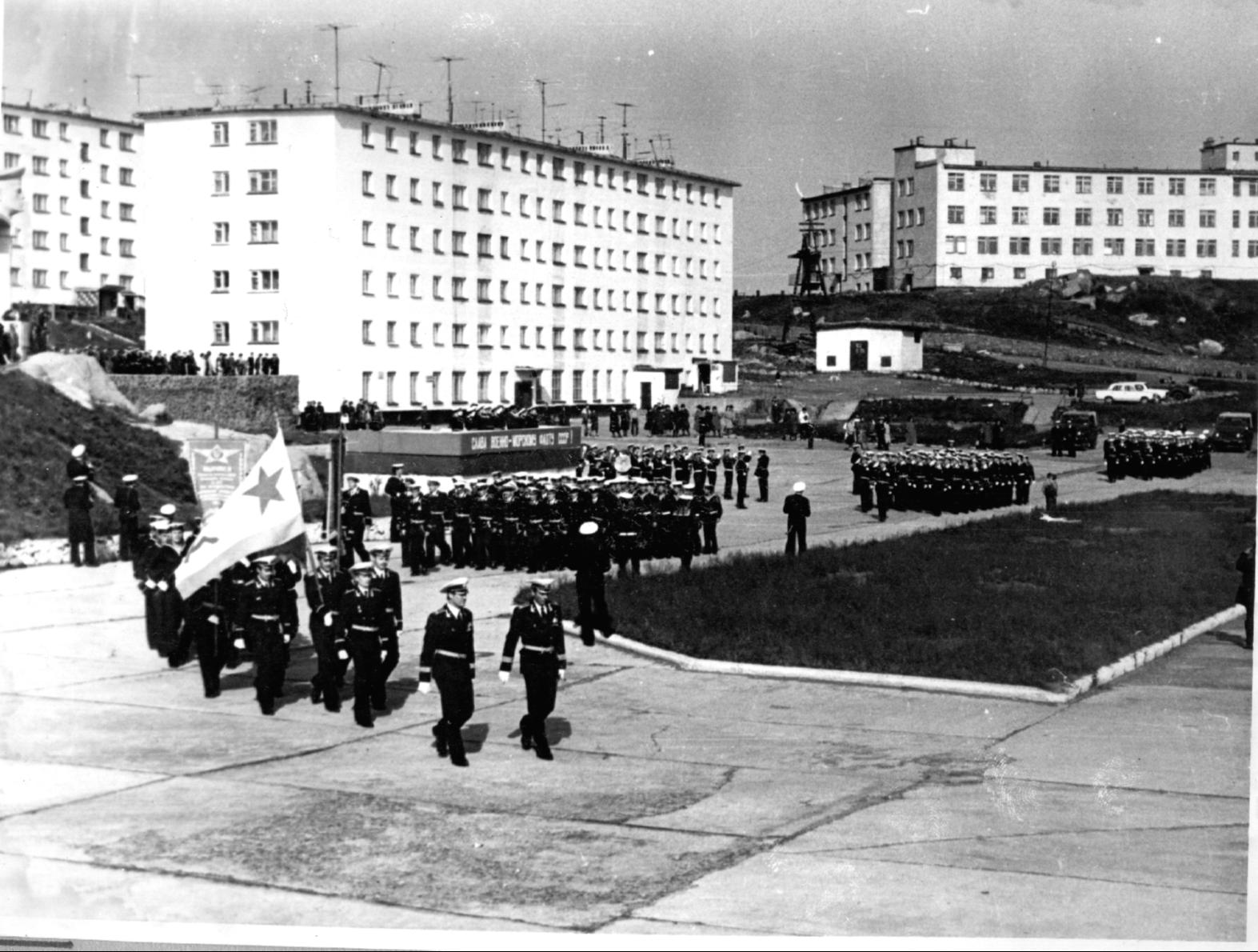 1978. Гремиха. 18 двпл